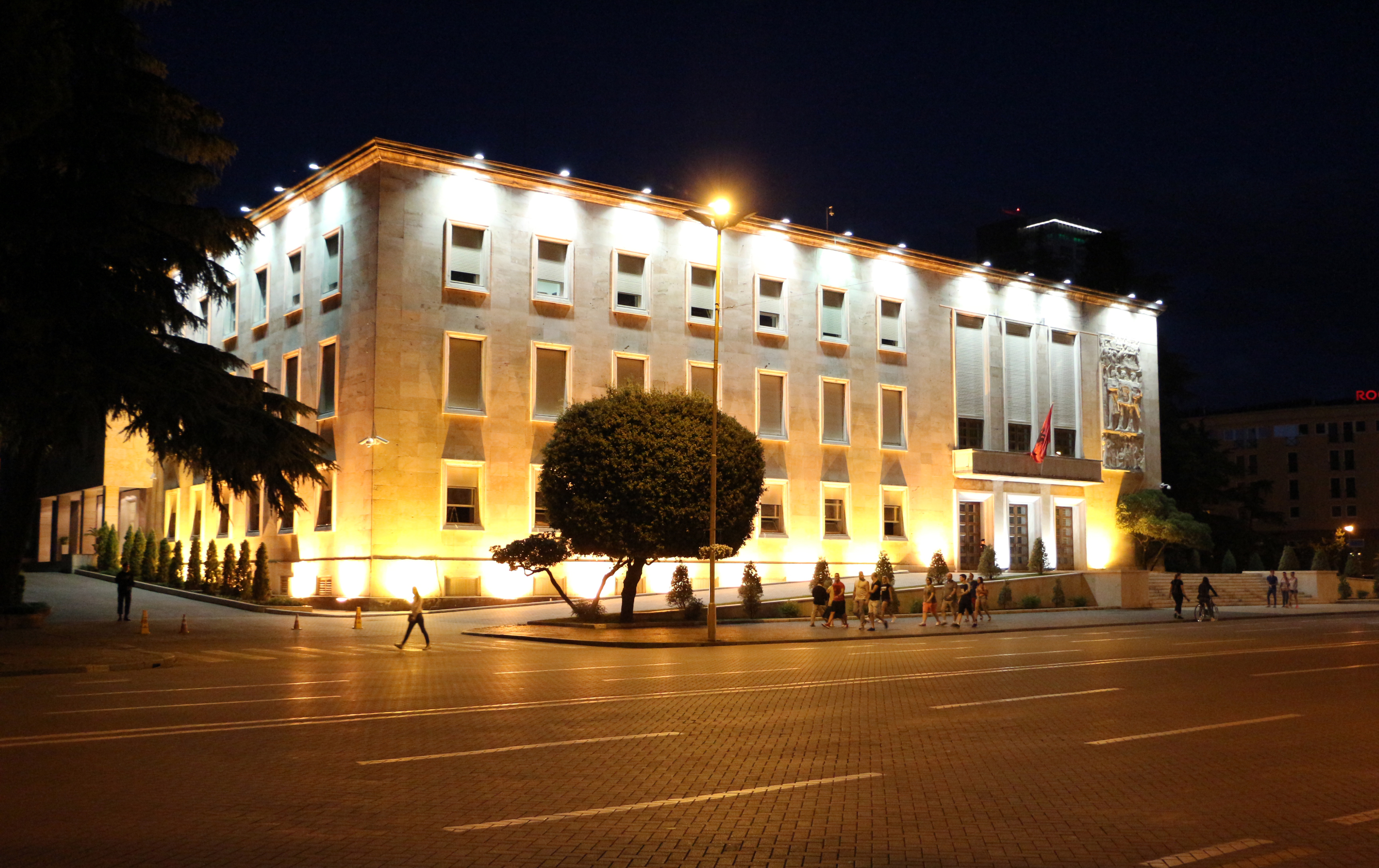 Kryeministria